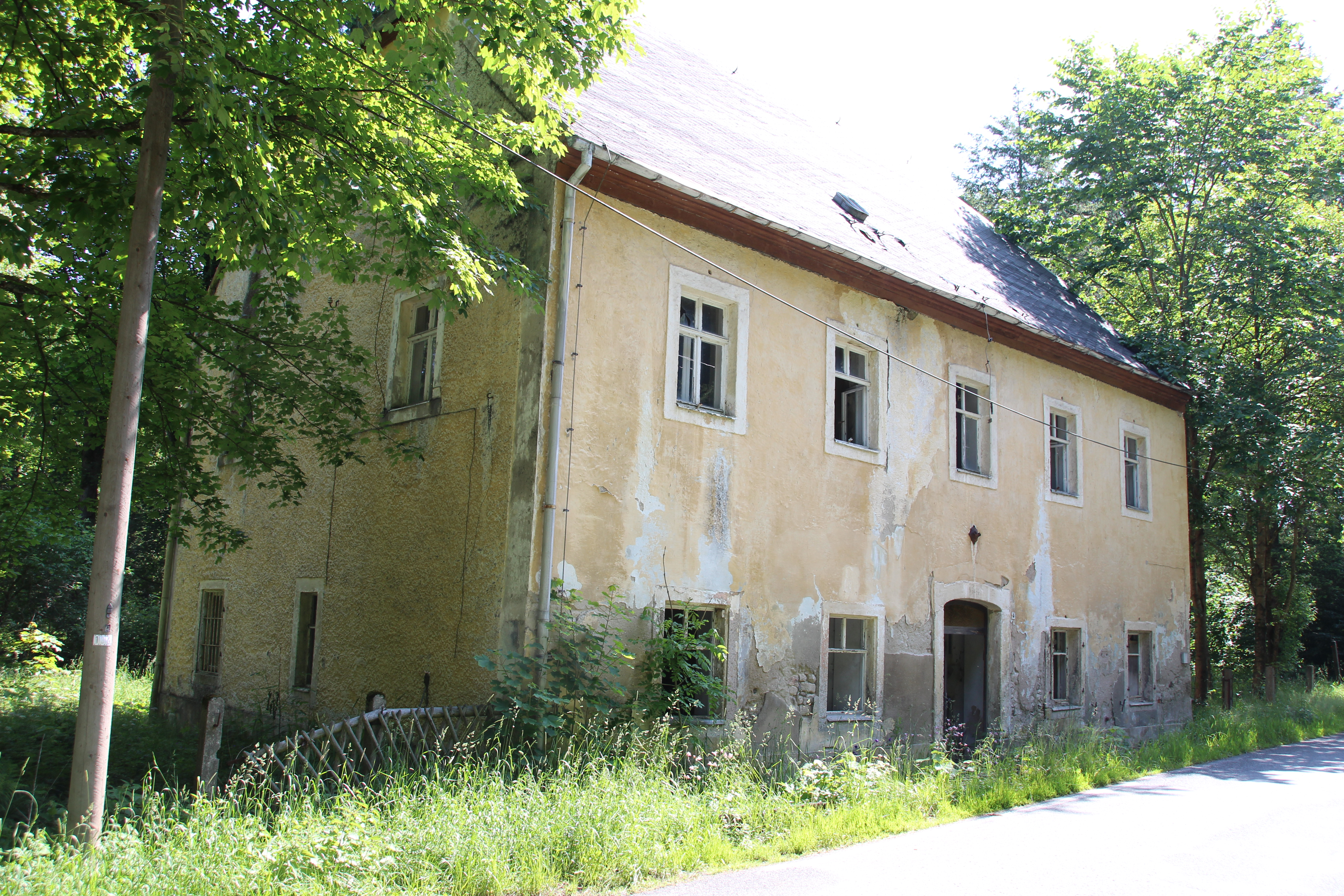 Wilzschmühle (Eibenstock): Eine kleine Siedlung im Tal der Wilzsch in einer Höhe von etwa 675 bis 690 Metern. einer der ältesten Bauten ist das ehemalige Forsthaus. Es ist 2015 eine Ruine. Der Träger aus Stein über der Eingangstür trägt das Datum „1804“ als Jahr der Errichtung.